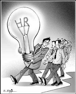 Es una imagen que representa los recursos humanos de una organización